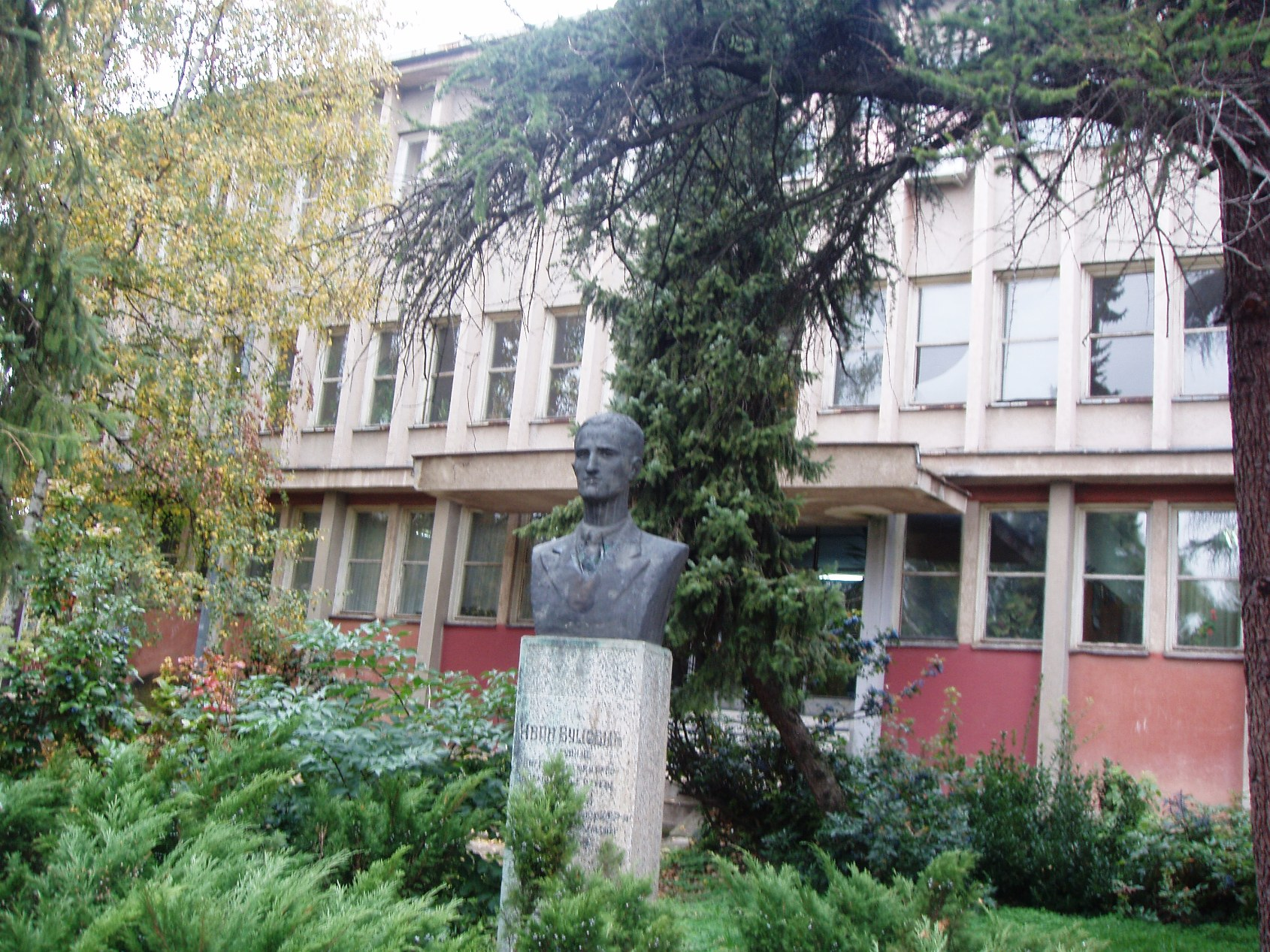 Зграда Општинe Ражањ